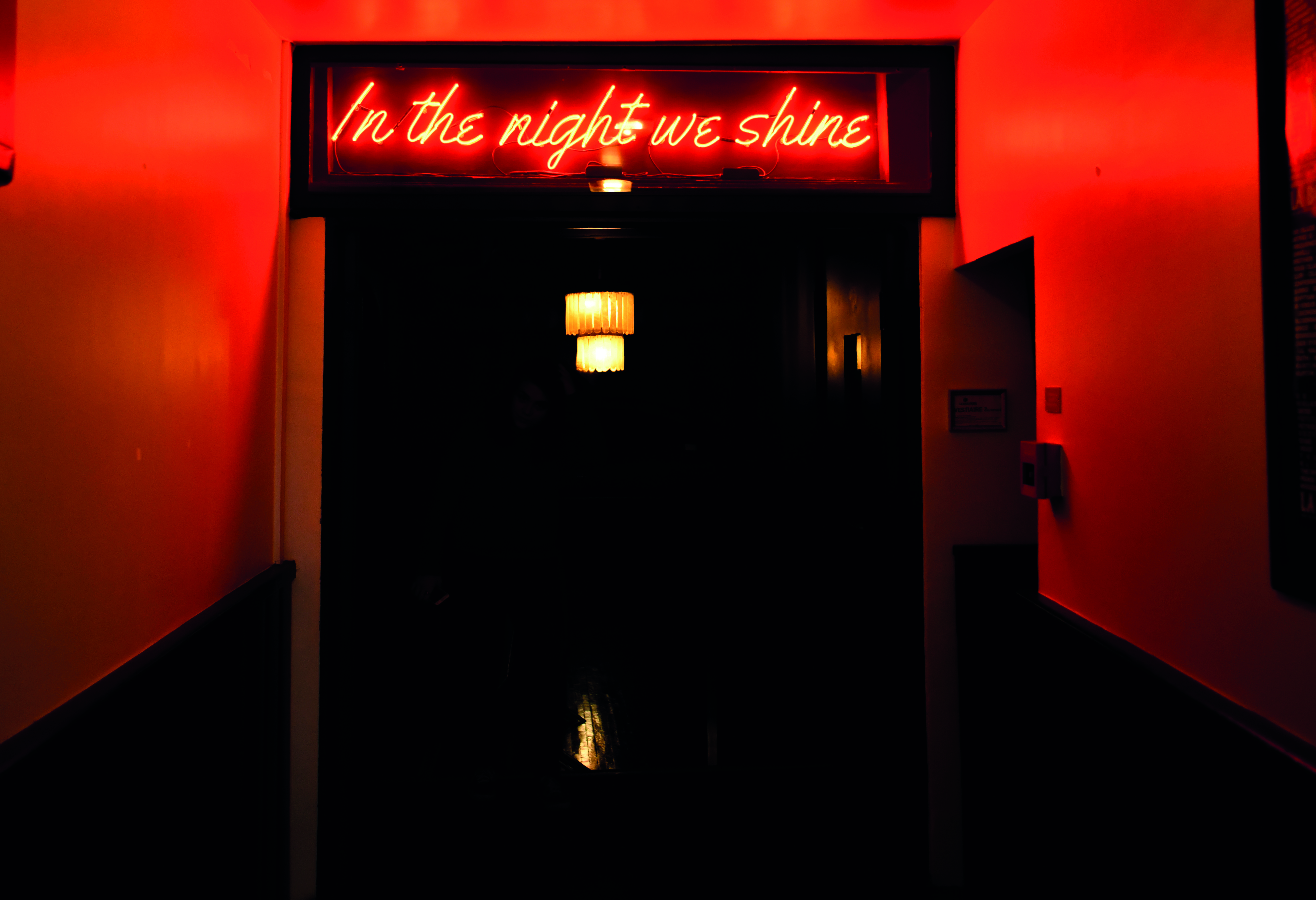 Hall de la Boule Noire